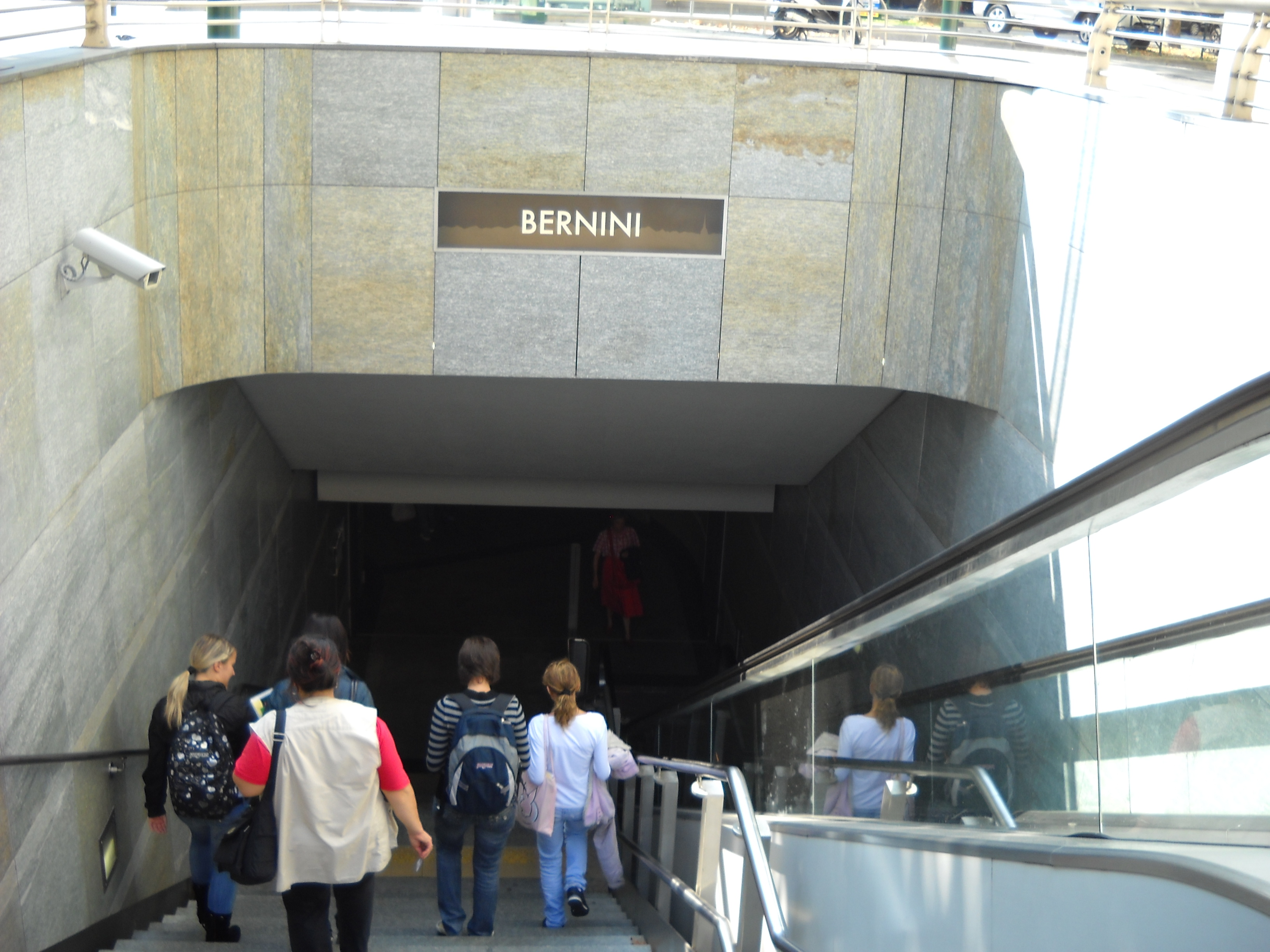 Entrata della Stazione Metropolitana di Piazza Bernini a Torino.